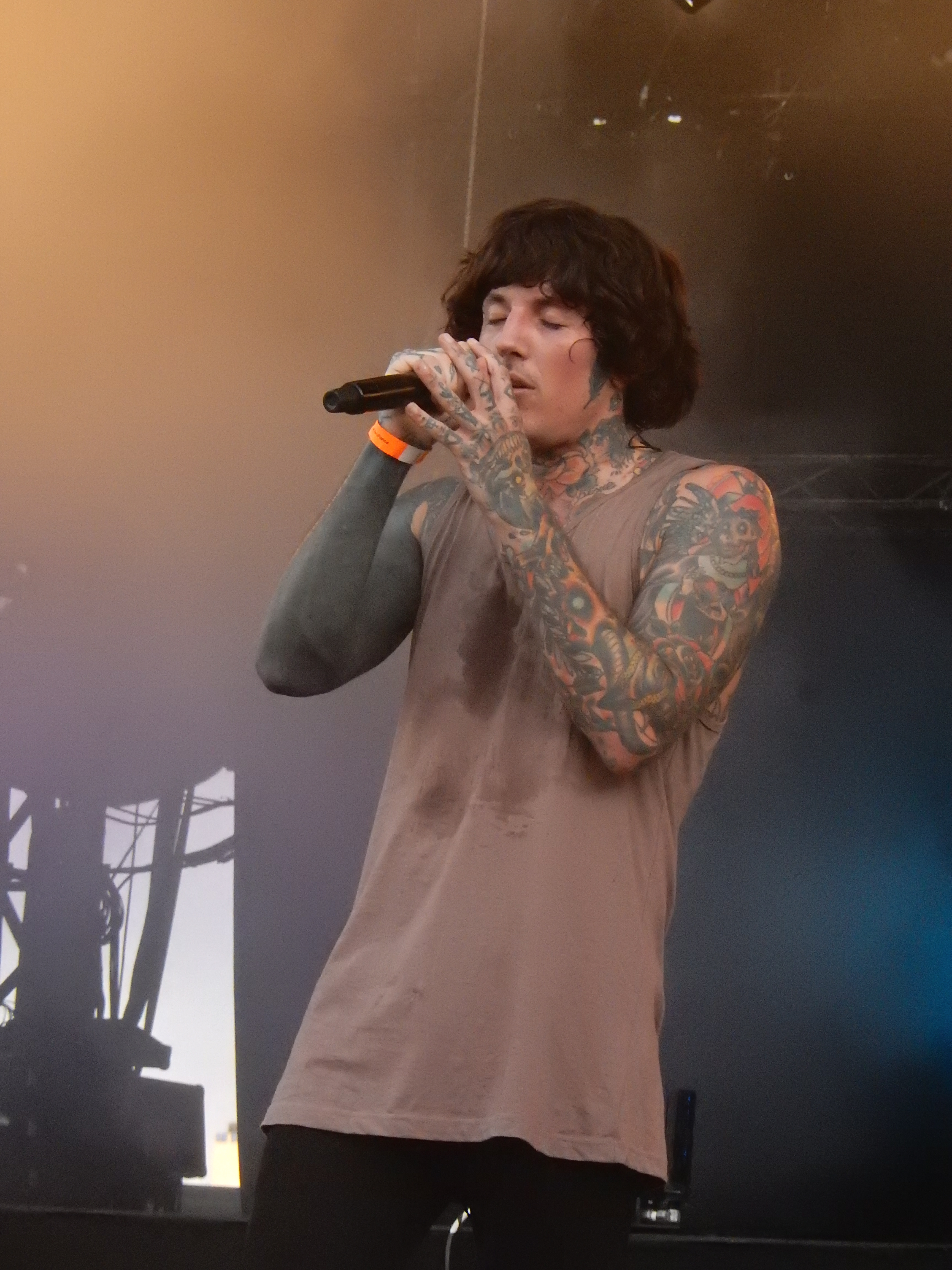 Bring Me The Horizon, Rock en Seine 2016, Paris